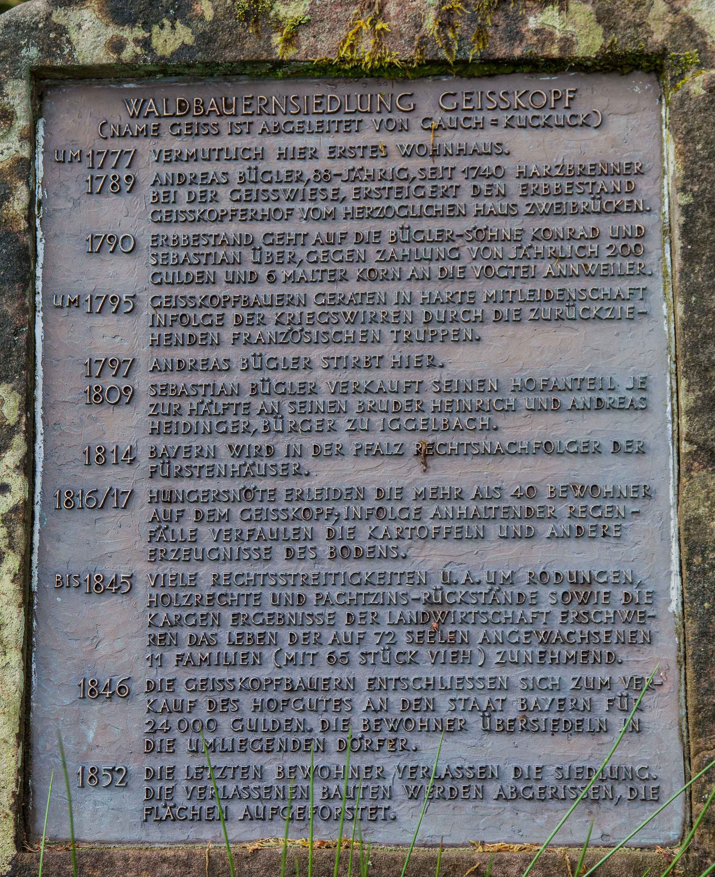 Denkstein Geiskopferhof